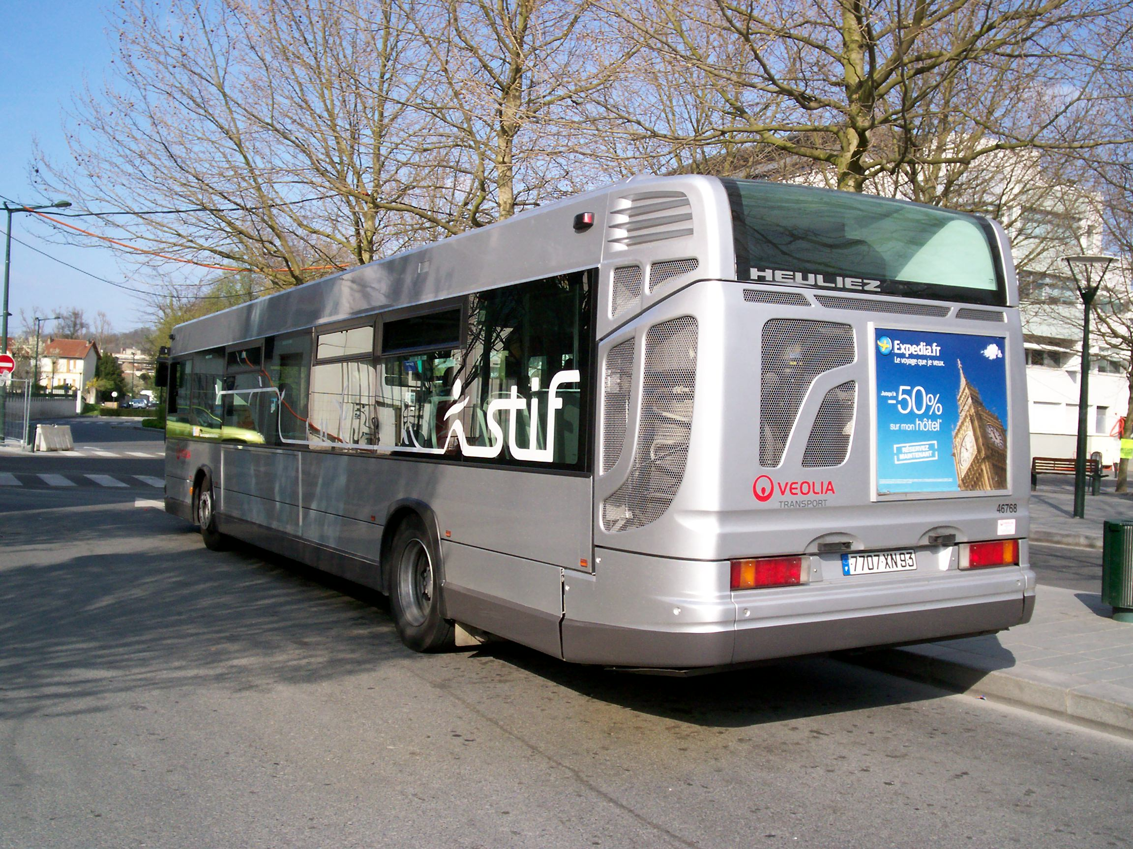 Bus GX317 en nouvelle livrée Veolia Transport - STIF à la gare de chelles